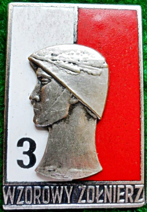 Odznaka Wzorowy Żołnierz